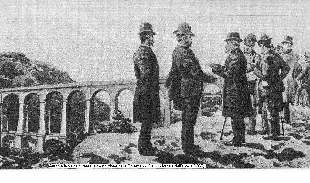 Autore:sconosciuto. stampa del 1863. Nota: In Italo Briano, "Storia delle ferrovie in Italia", volume primo, pag. 152, viene citata come:"Funzionari e tecnici in visita alla Succursale dei Giovi, in prossimità del viadotto di Campomorone (1890).